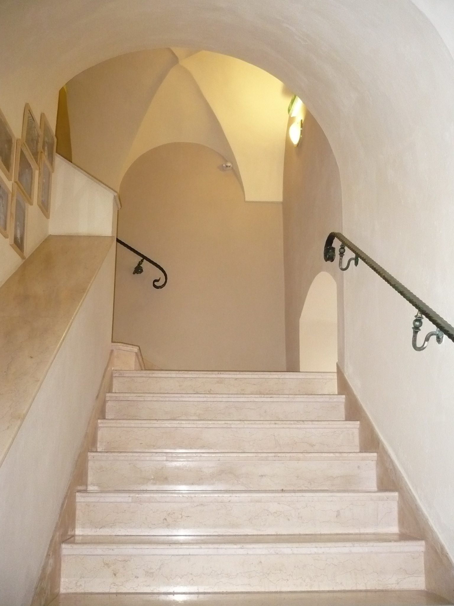 Nowa Ruda, ul. Kościelna 30 - Dwór Górny, obecnie hotel, XVII, XIX w. (zabytek nr A/940/652/WŁ z 25.05.1977)